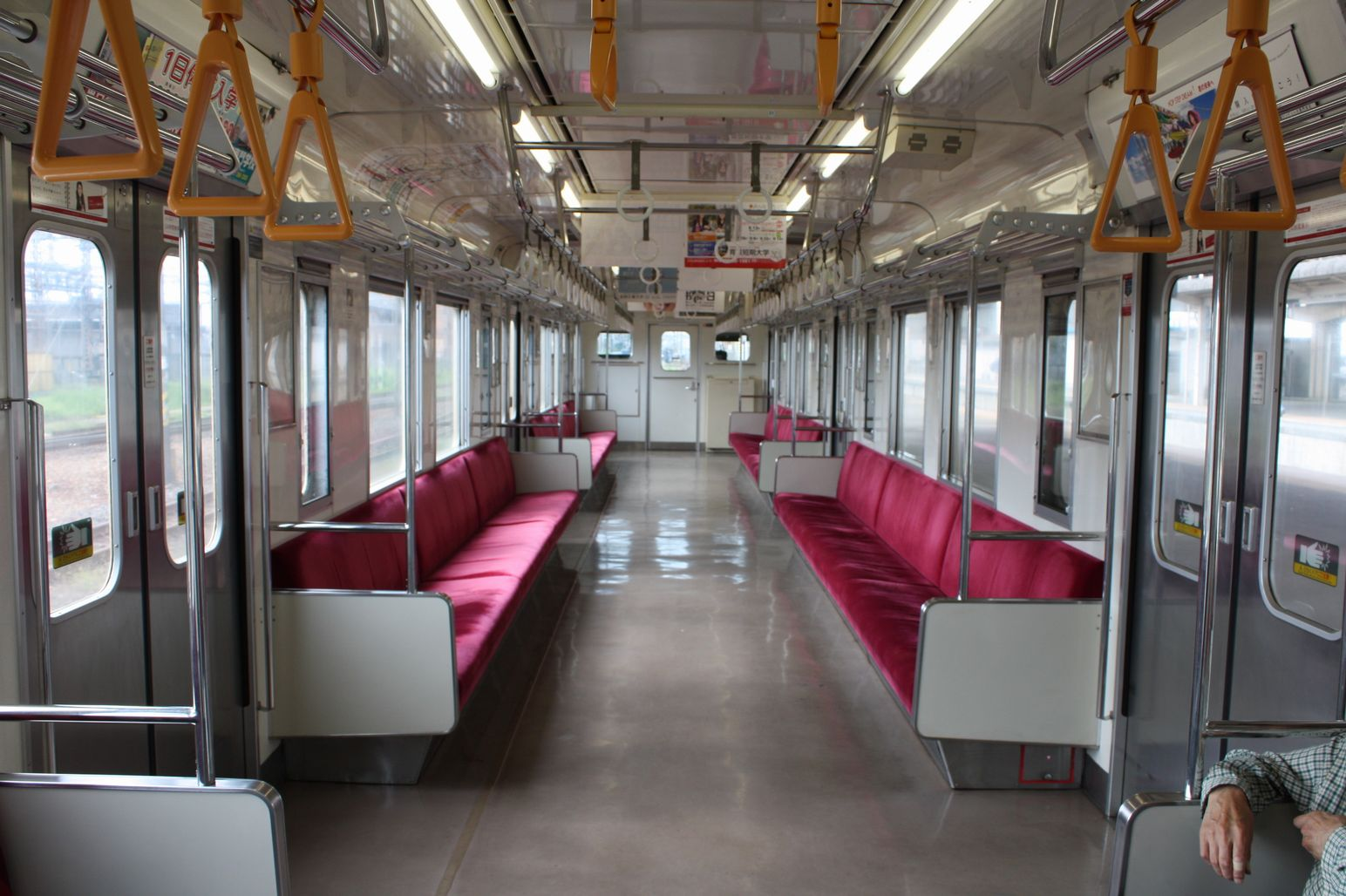 107系100番台の車内